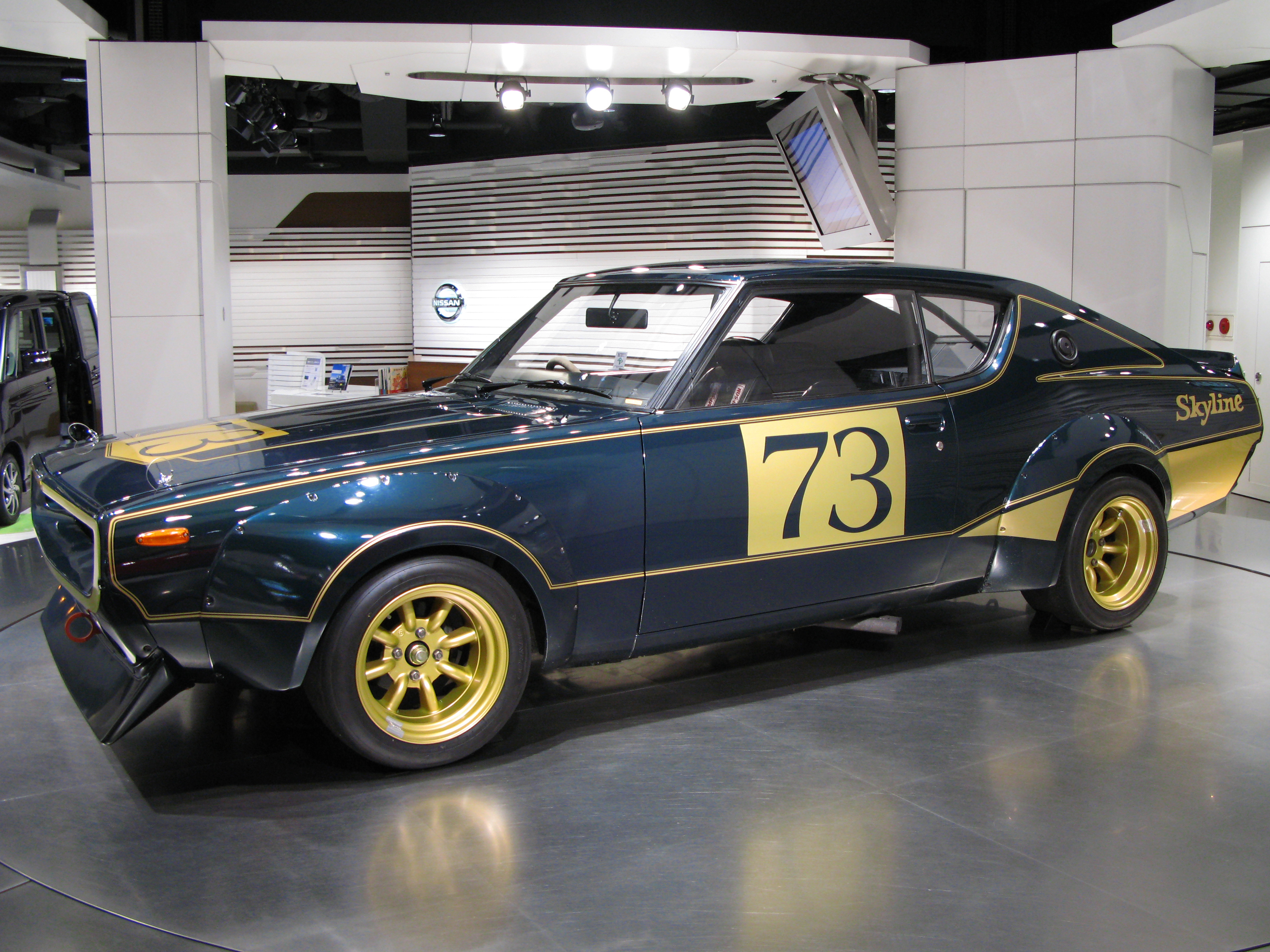 NISSAN SKYLINE 2000GT (KPGC110)1972.